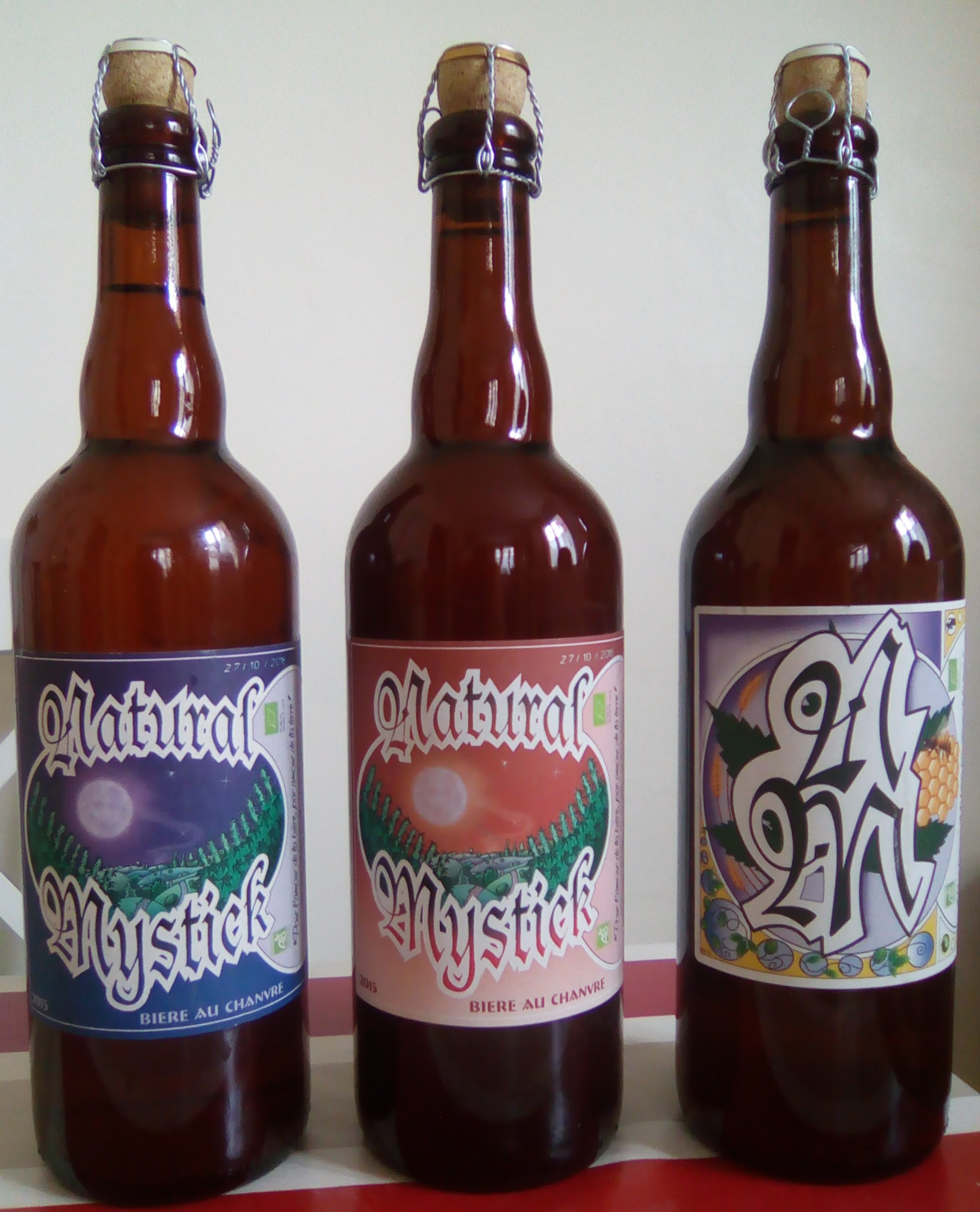 Bouteilles de bière blonde bio Natural Mystick (version, 5,8°, 7,5° et 6,5° arôme miel)